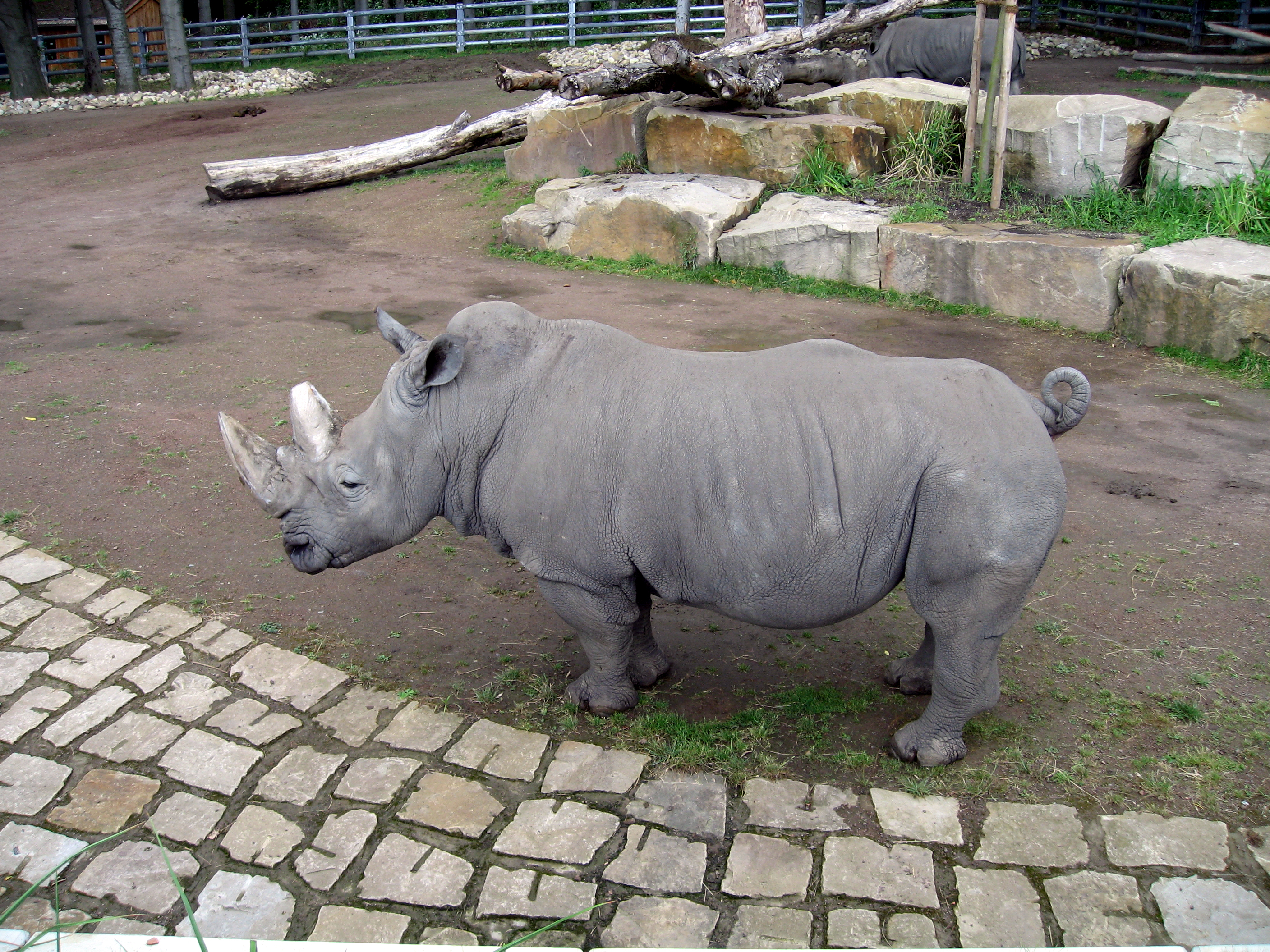 Dortmund, Tierpark, Breitmaulnashorn